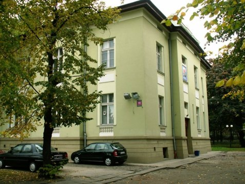 Siedziba WSTH w Łodzi przy ul. Senatorskiej 11